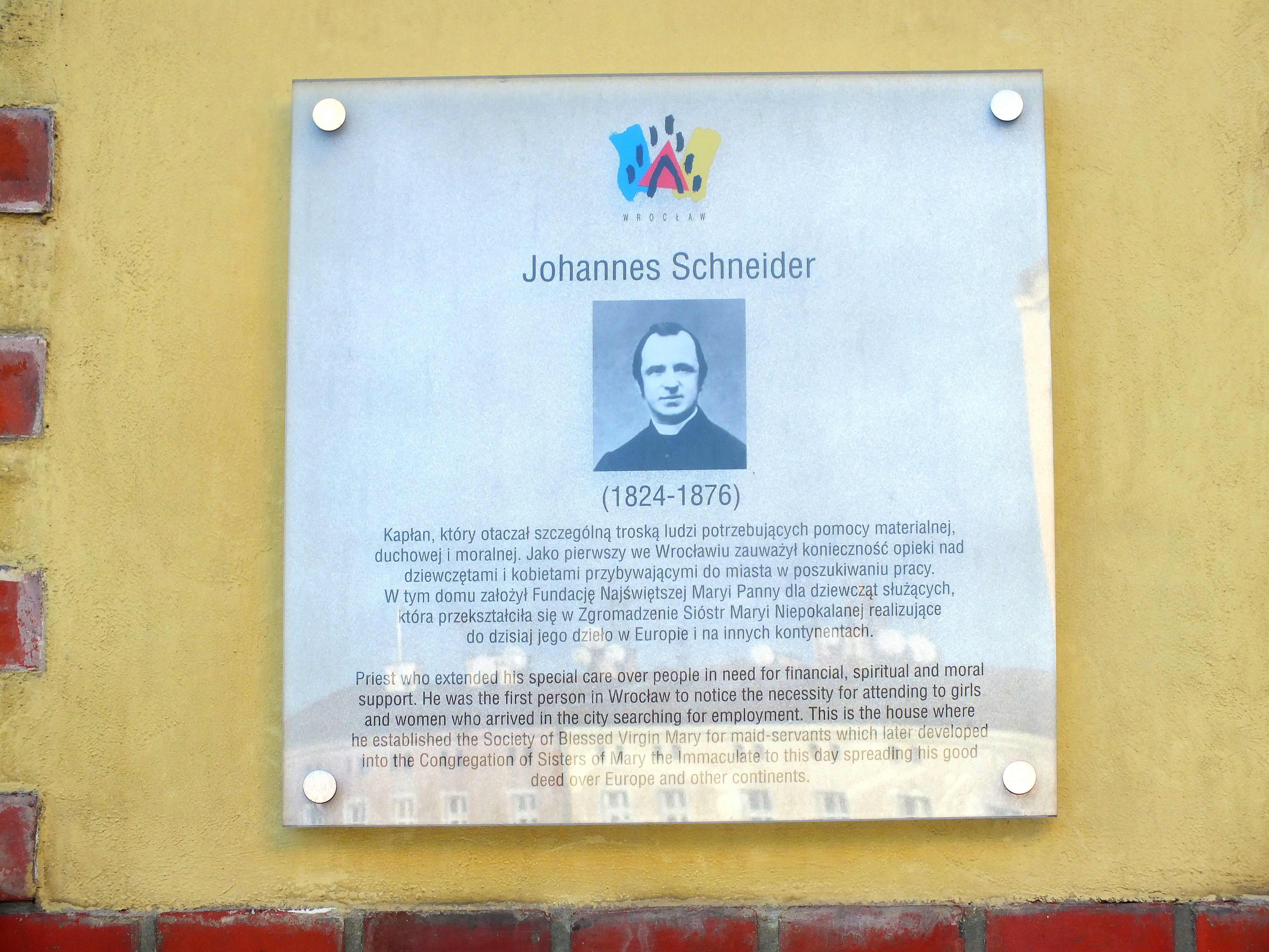 Wrocław, ul. Kard. B. Kominka 3-5, Zgromadzenie Sióstr Maryi Niepokalanej, tablica poświęcona Johannowi Schneiderowi.